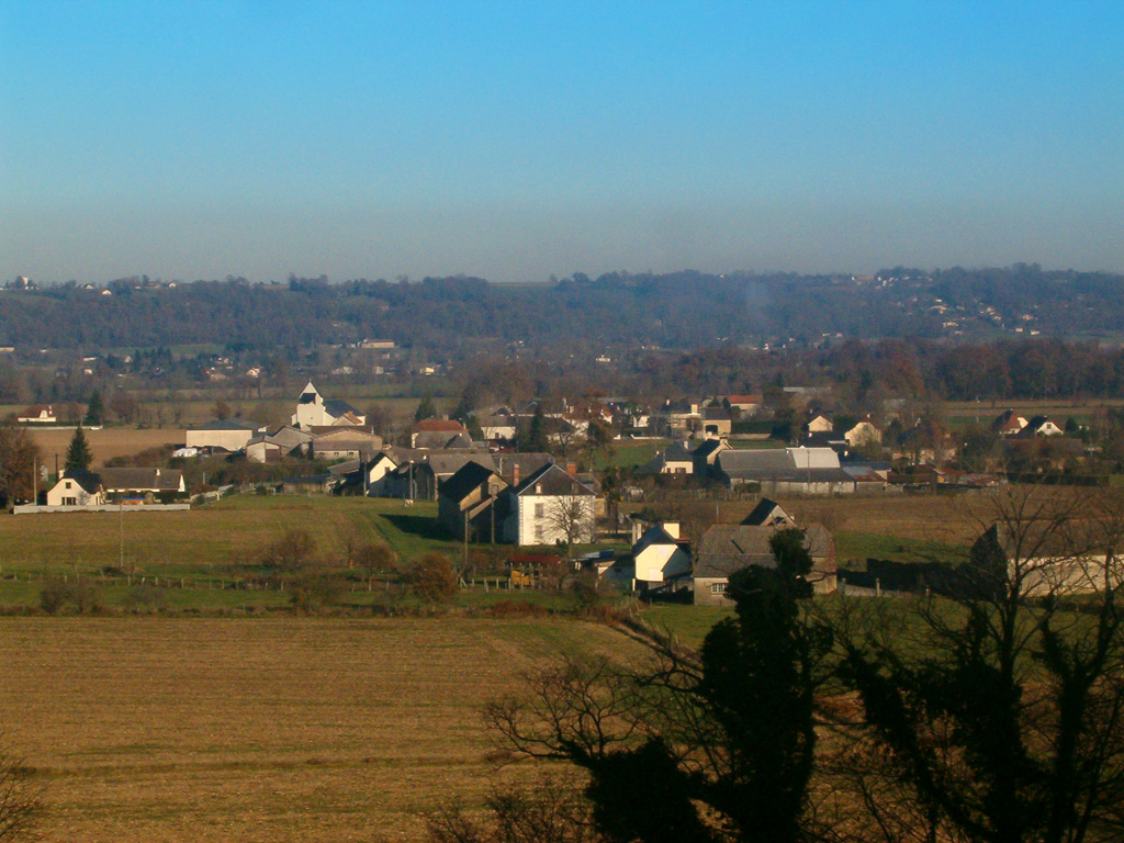 Lucgarier1.jpg